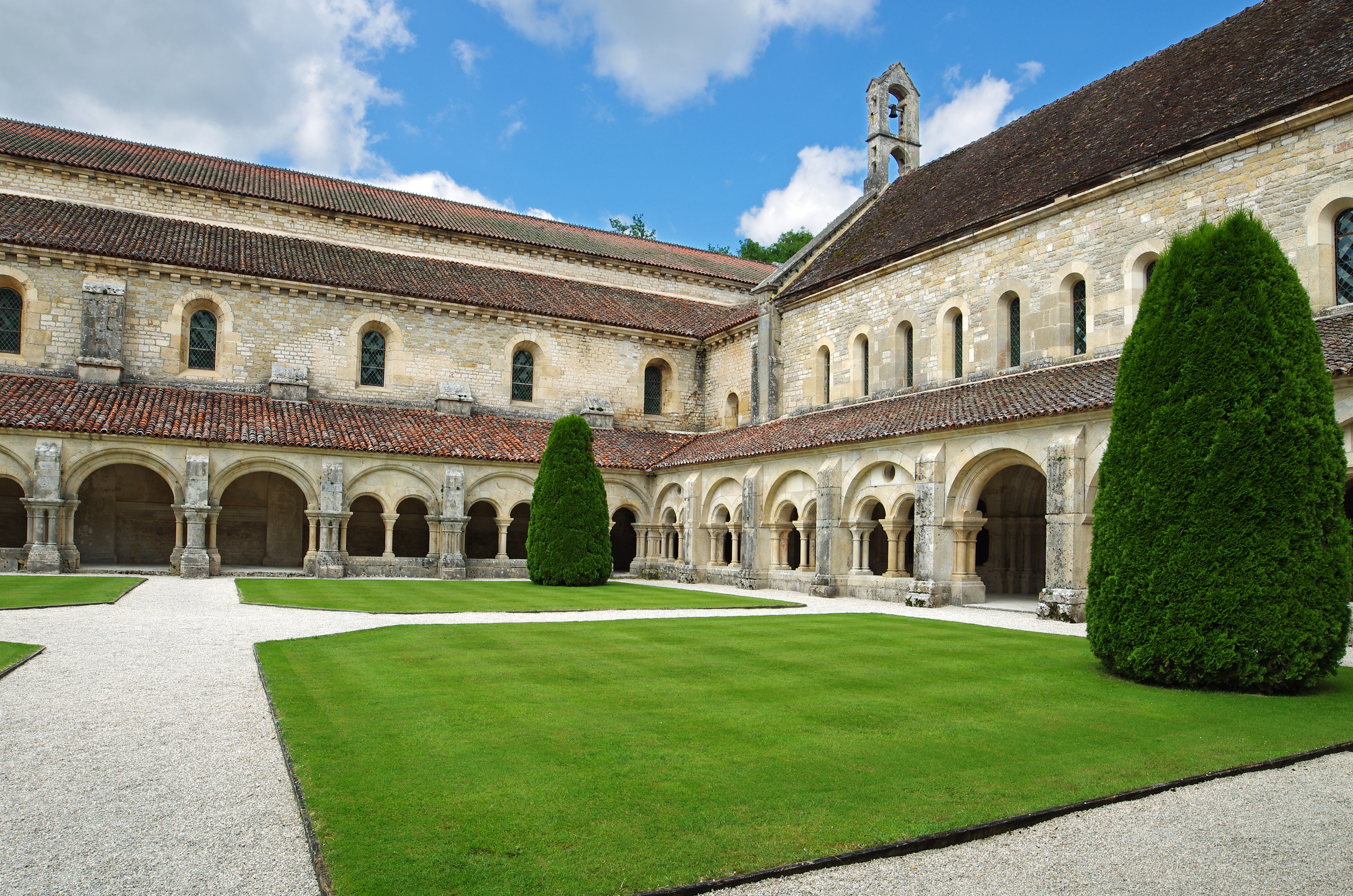 L'abbaye de Fontenay. Le cloître.